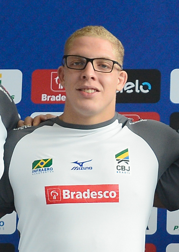 Rio de Janeiro - Equipe masculina convocada pela Confederação Brasileira de Judô (CBJ) para disputar os Jogos Olímpicos Rio 2016, posa para fotos (Tânia Rêgo/Agência Brasil)